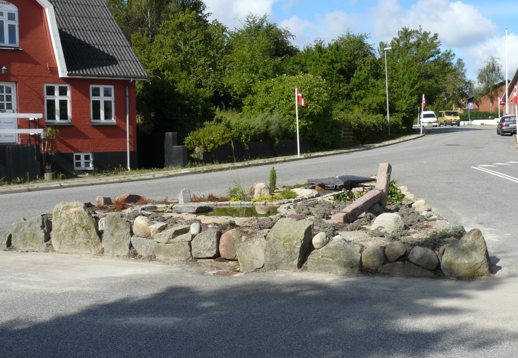 Springvandet i Veddum